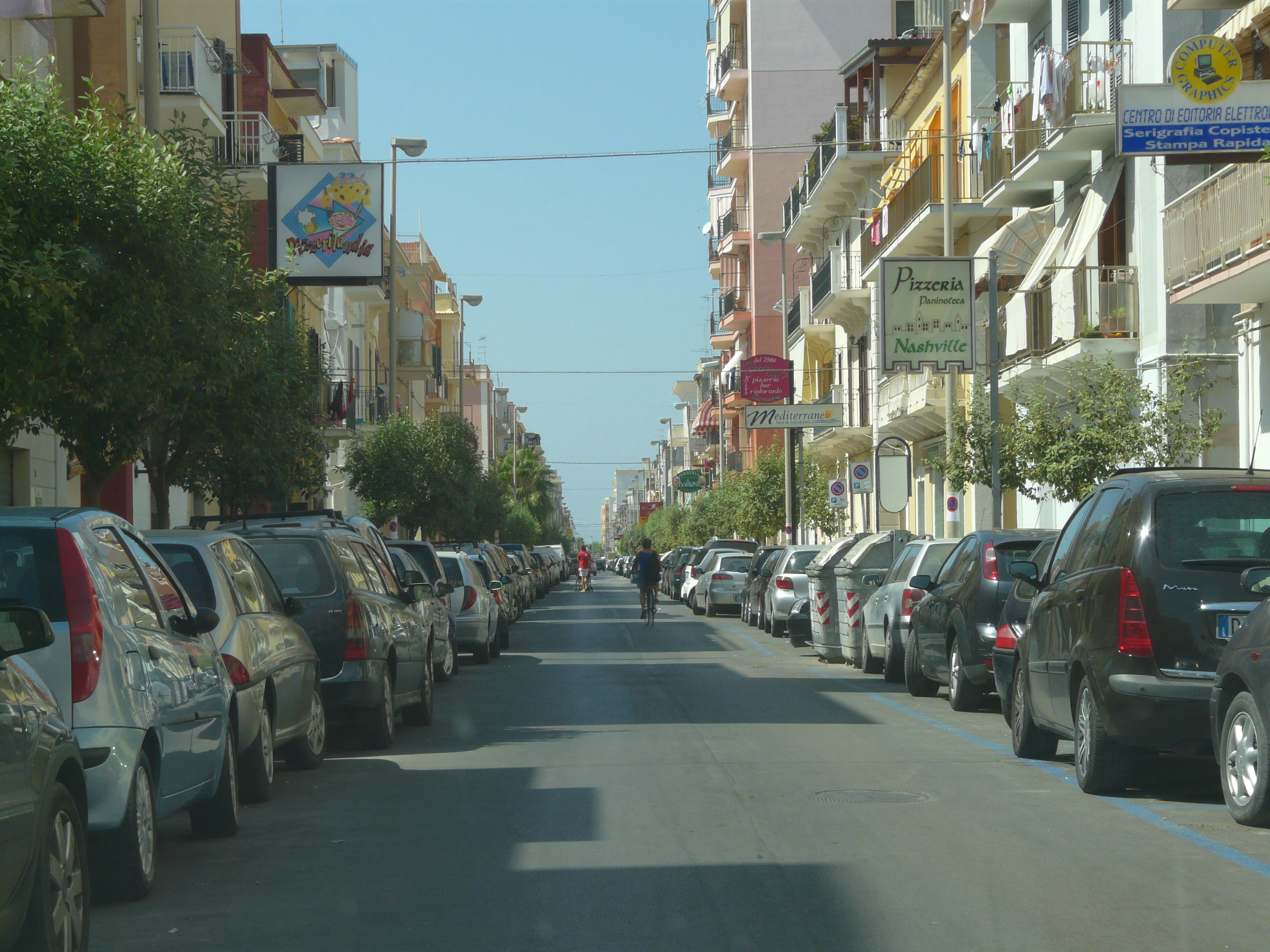 Margherita di Savoia